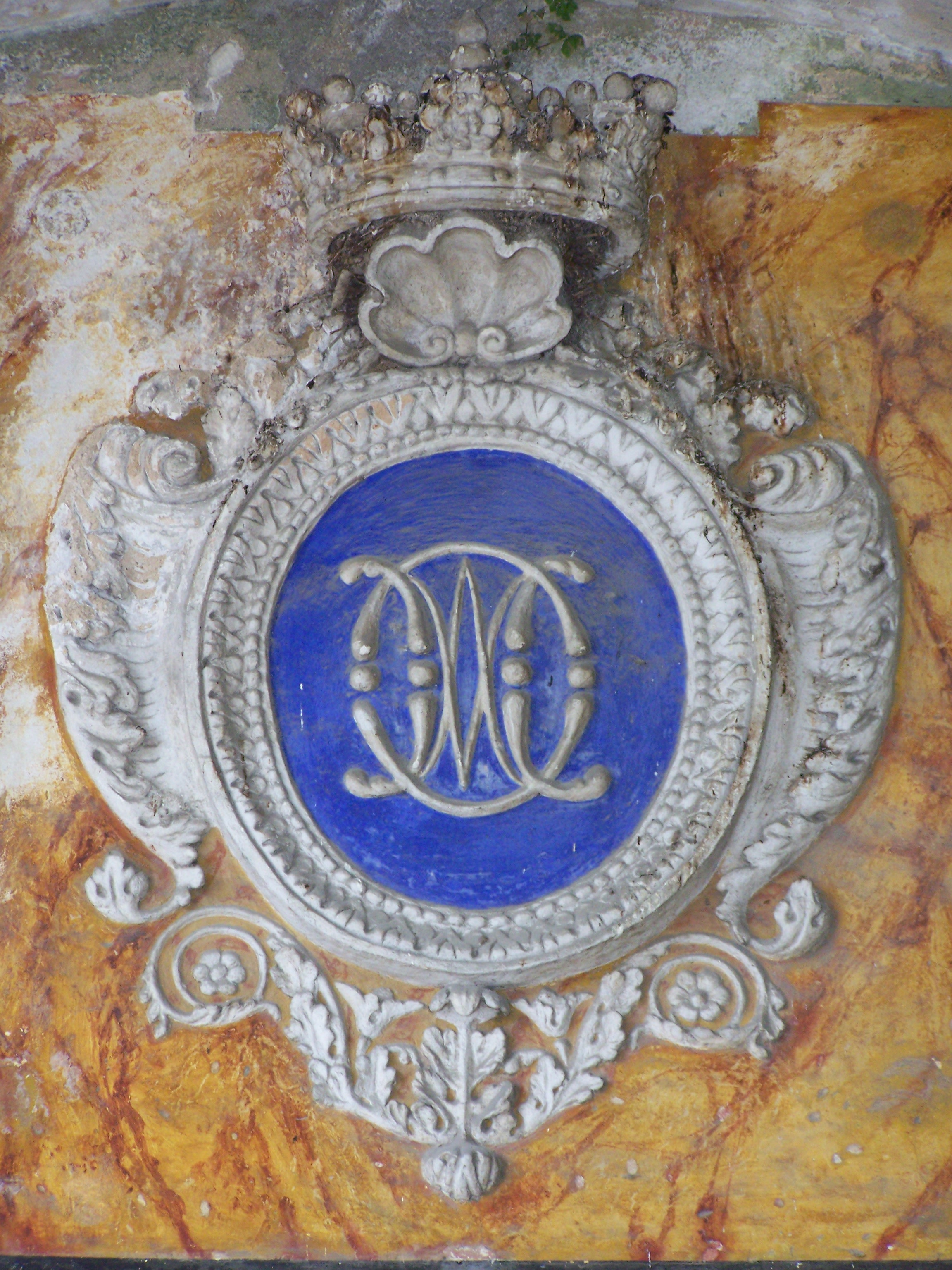 Stuc portant le blason de l'ordre religieux catholique romain des "Oblats de Marie-Immaculée", placé au-dessus de la porte d'accès à l'église de l'abbaye Saint-Pons de Nice (France)